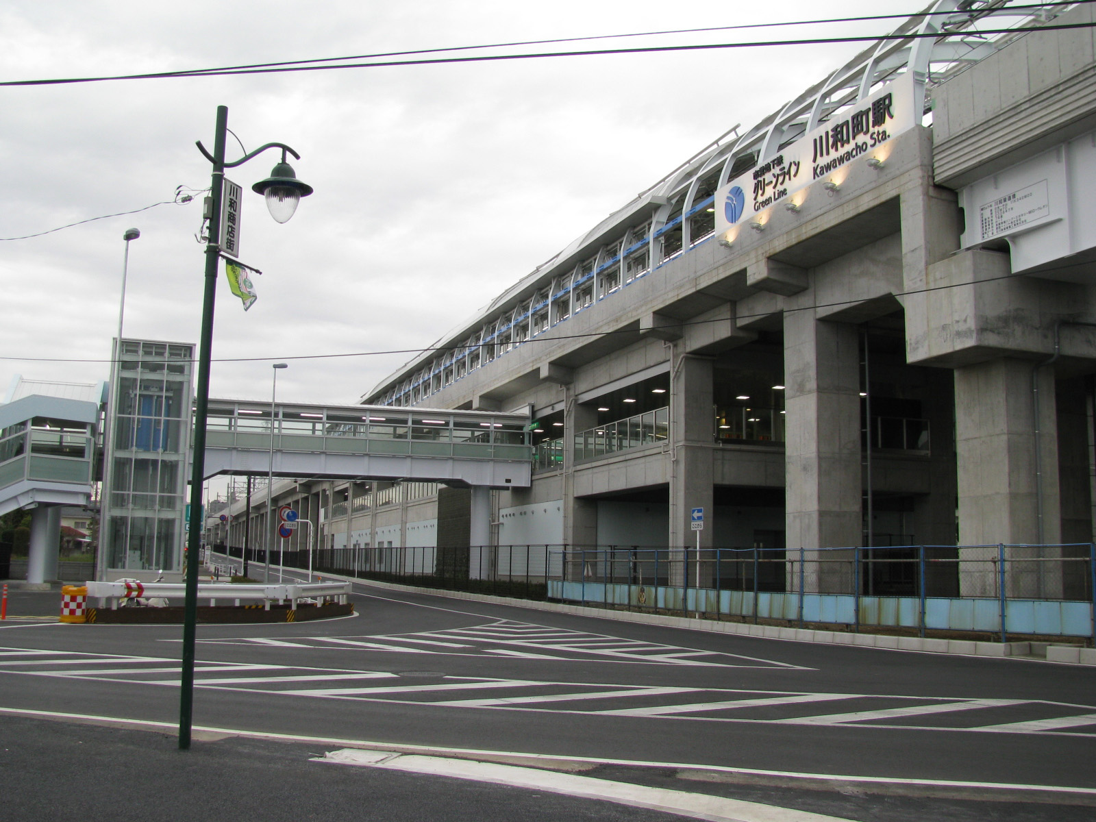 横浜市営地下鉄グリーンライン川和町駅